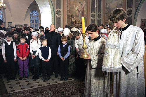 ВЕЛИКИЙ УСТЮГ, ПРОКОПЬЕВСКИЙ СОБОР. На рождественском богослужении.